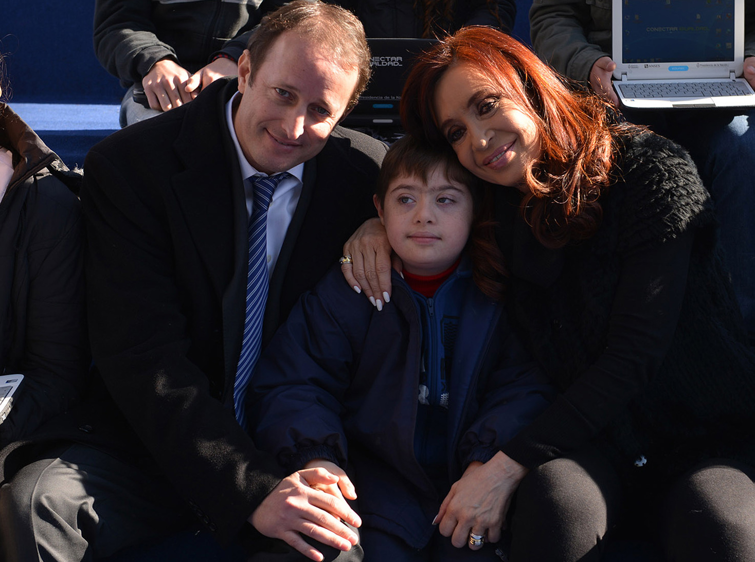 La Presidenta entrega la netbook 3 millones del Plan Conectar Igualdad